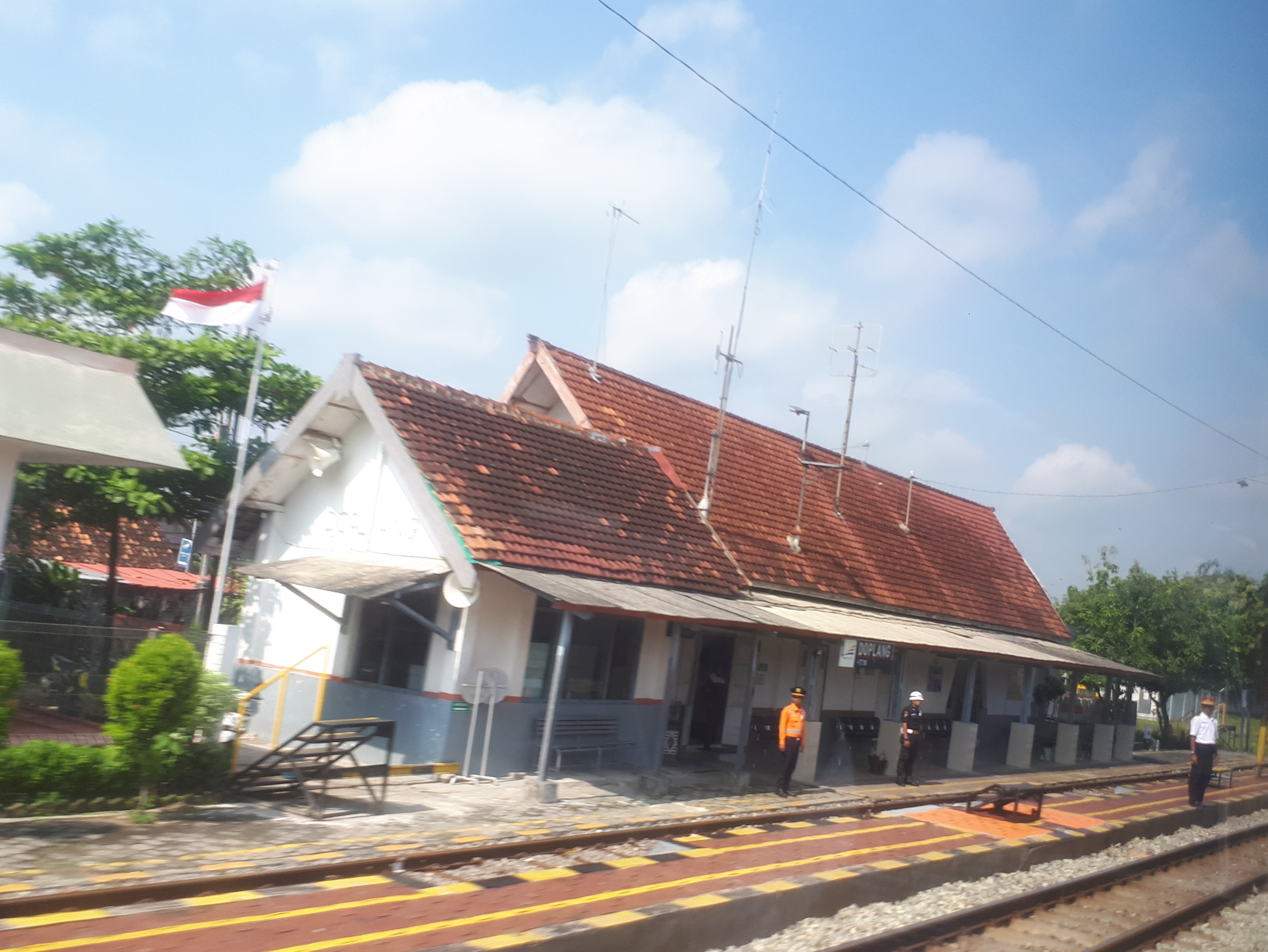 Stasiun Doplang tahun 2020